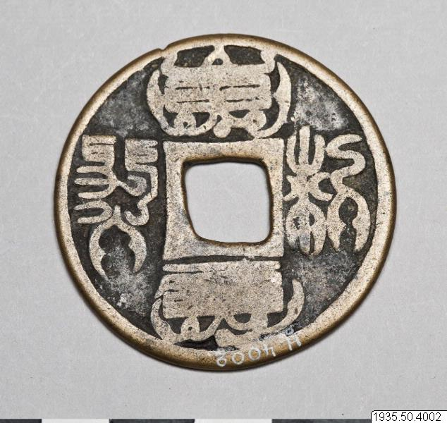 "Amulettmynt. Fyrkantigt hål i mitten. Starkt nött. På ena sidan 4 skrivtecken, på den andra stående figur samt emblem." (MLK) Foto av myntets ena sida finns i HBE. "H.3960-4158 diverse bronser från Mongoliet och Gansu. Till stor del förvärvade av Josef Söderbom." (MLK) 1935.50.4002 Hedinexpeditionen, fjärde centralasiatiska expeditionen (1927-1935).